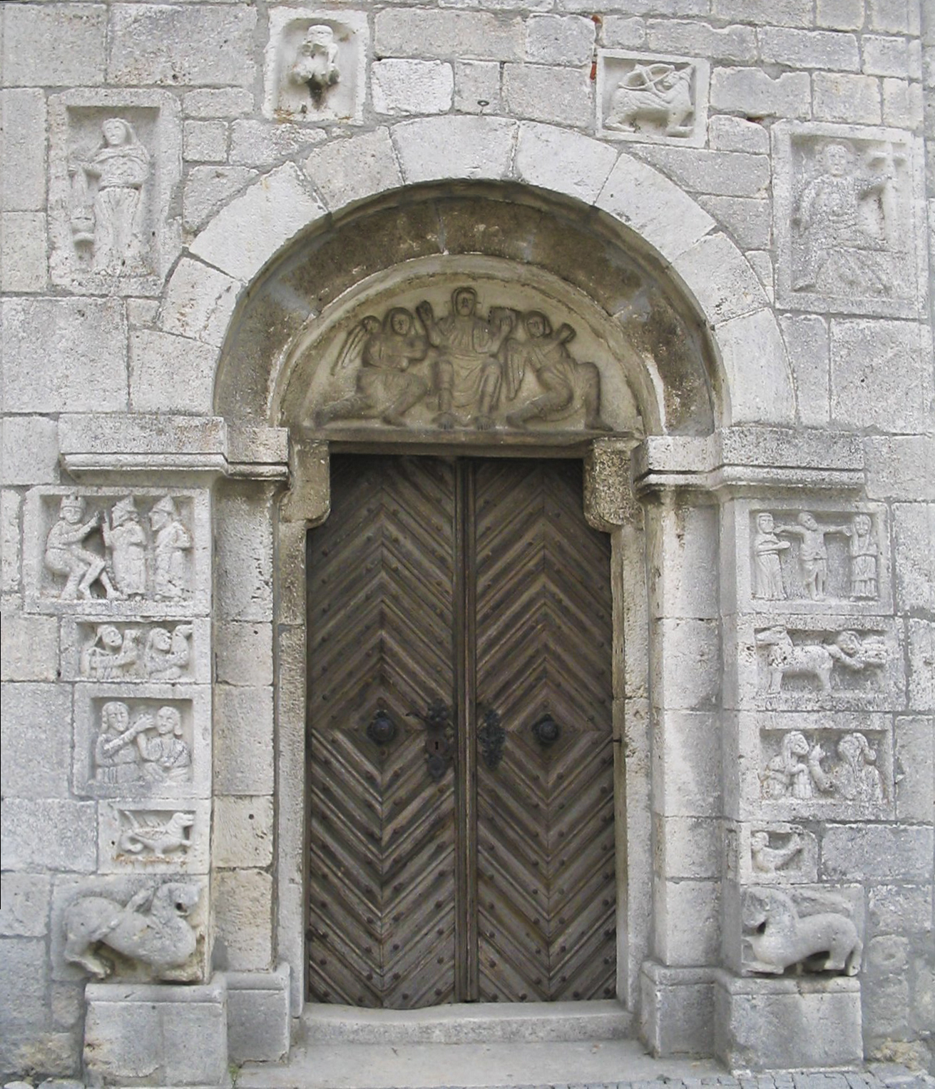 Portal der St.-Andreas-Kirche in Bad Gögging